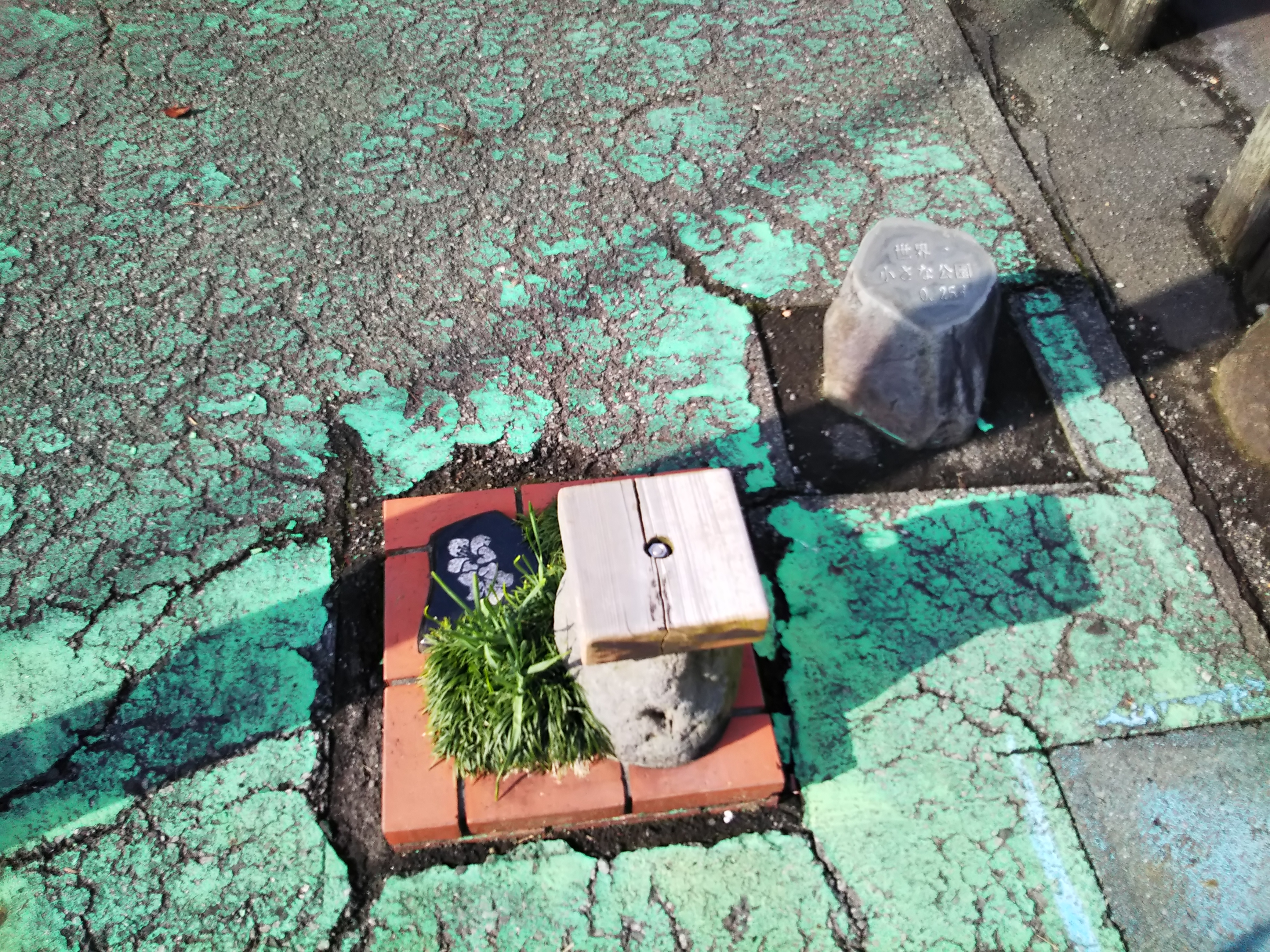 静岡県長泉町の、世界一小さな公園。厳密には道路施設の一部であり公園ではなく、ギネス世界記録に登録されてはいないとのこと。